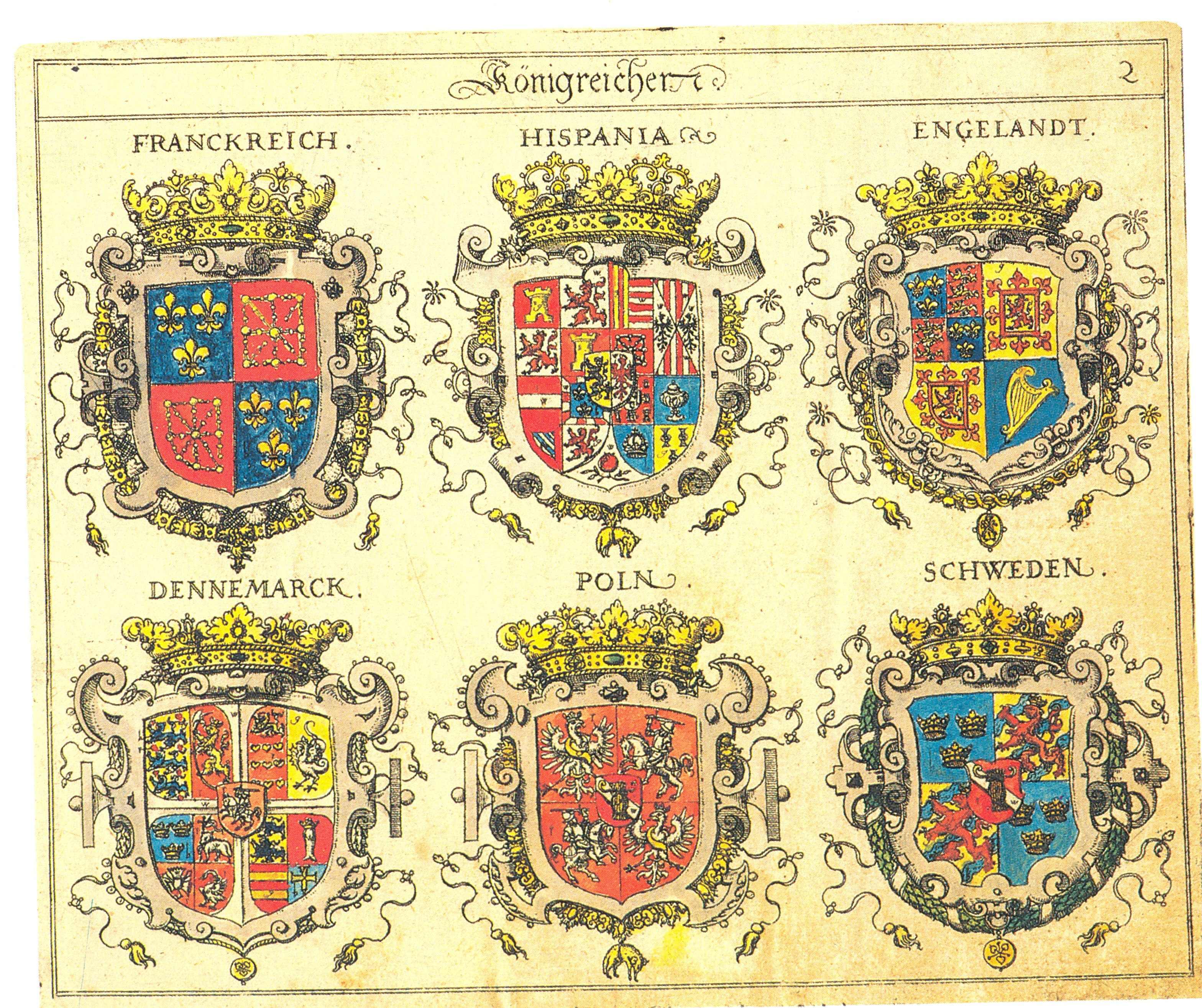 Johann Siebmacher: New Wappenbuch Benachtbarte Königreiche Blatt 2